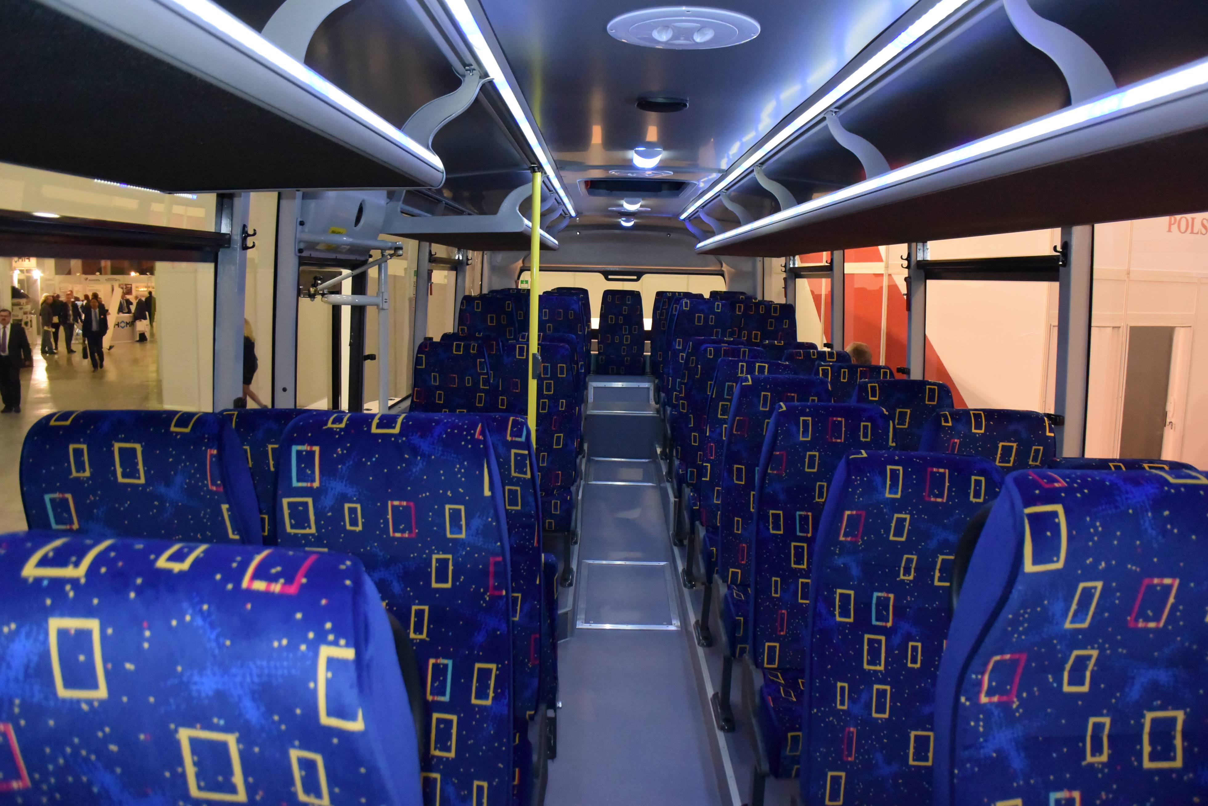 Troliga Bus Pegasus, Transexpo 2014, Kielce